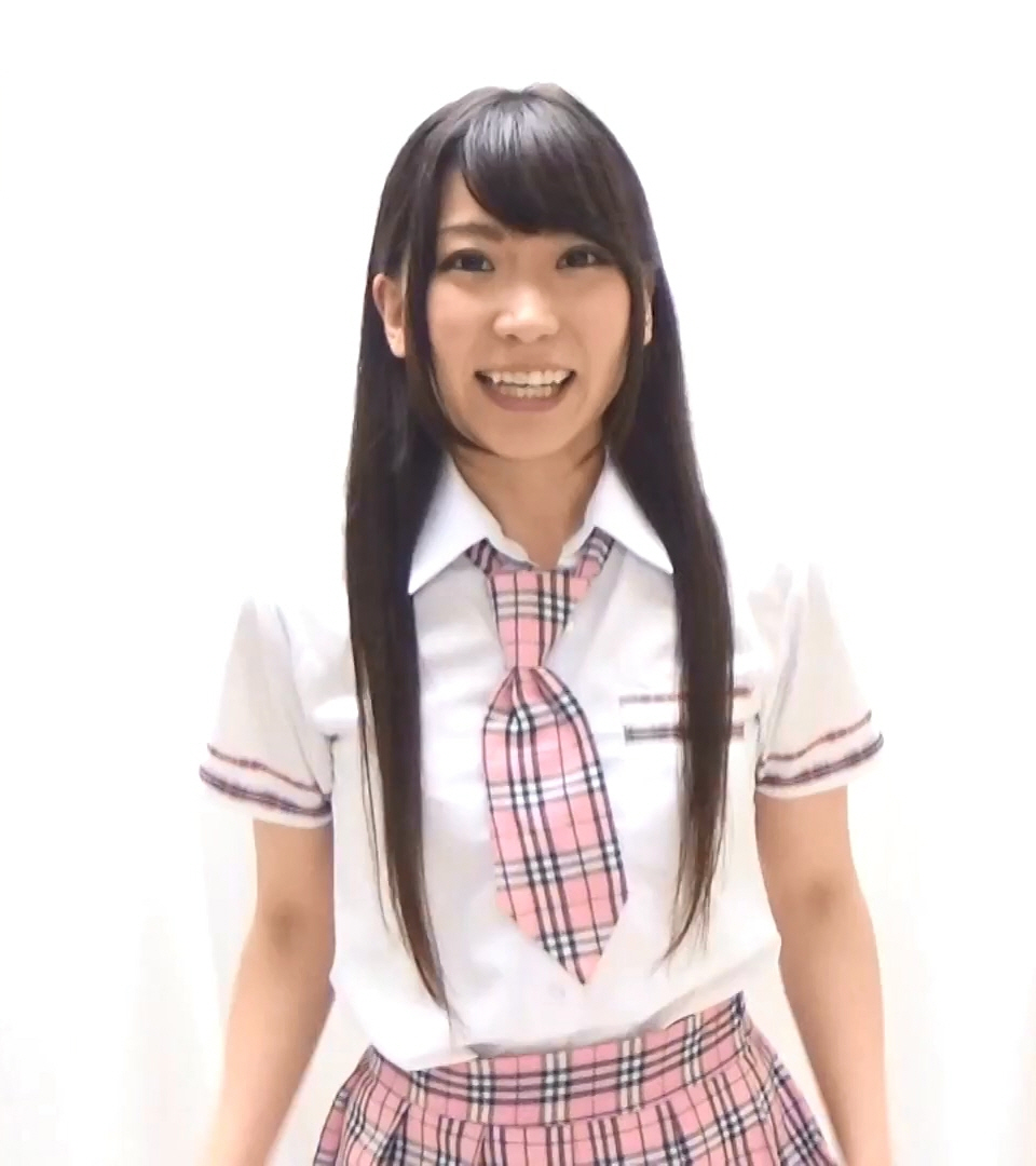 平塚 由佳